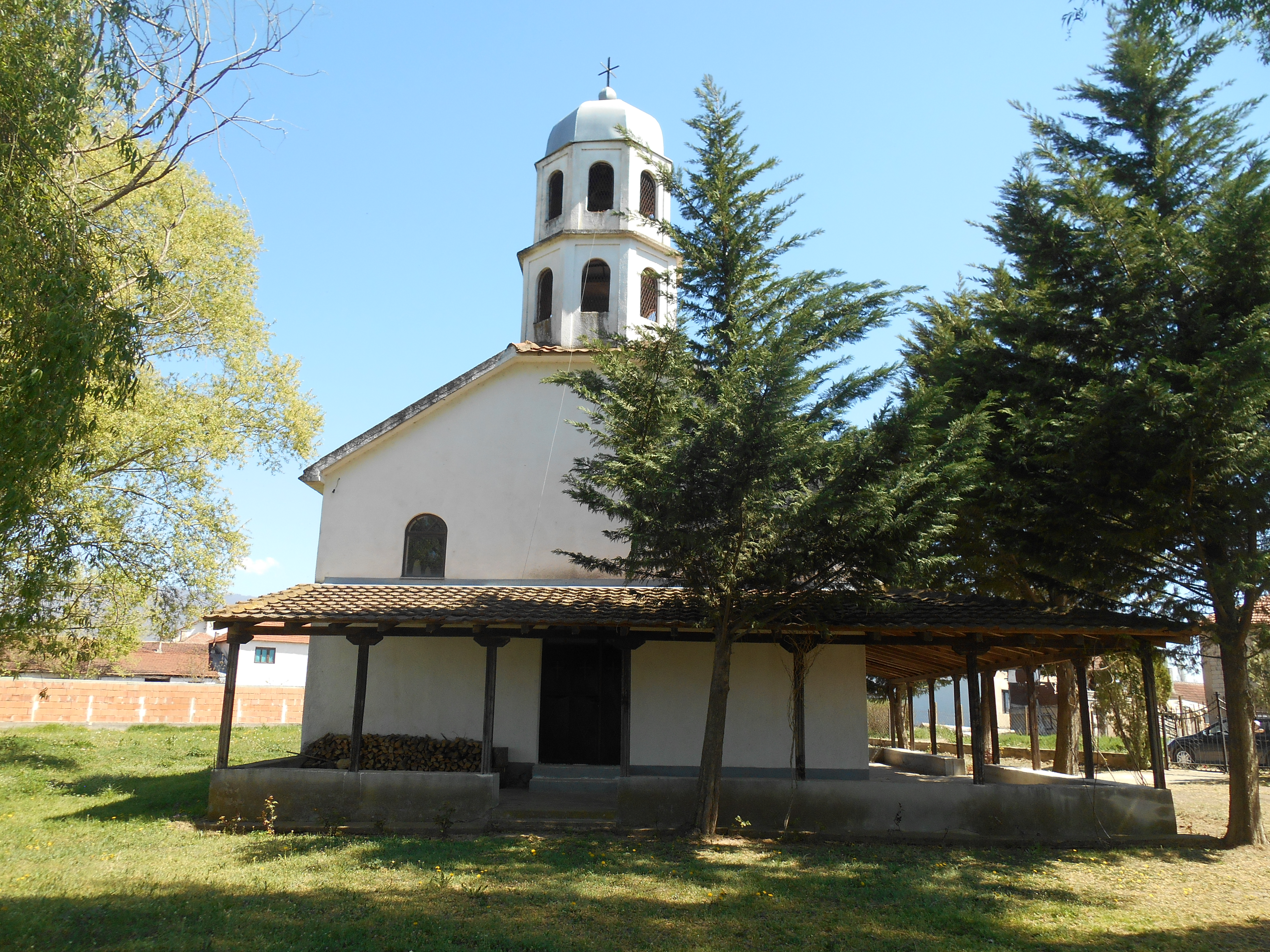 Црква во Гечерлија